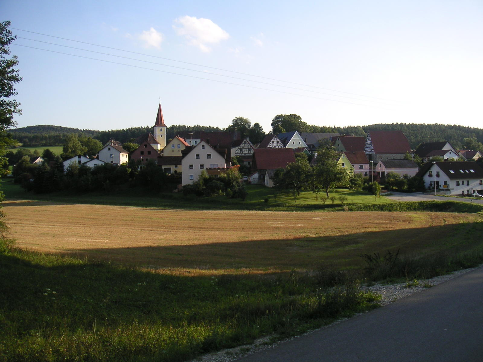 Fürnried, von Richtung Wurmrausch aus fotografiert